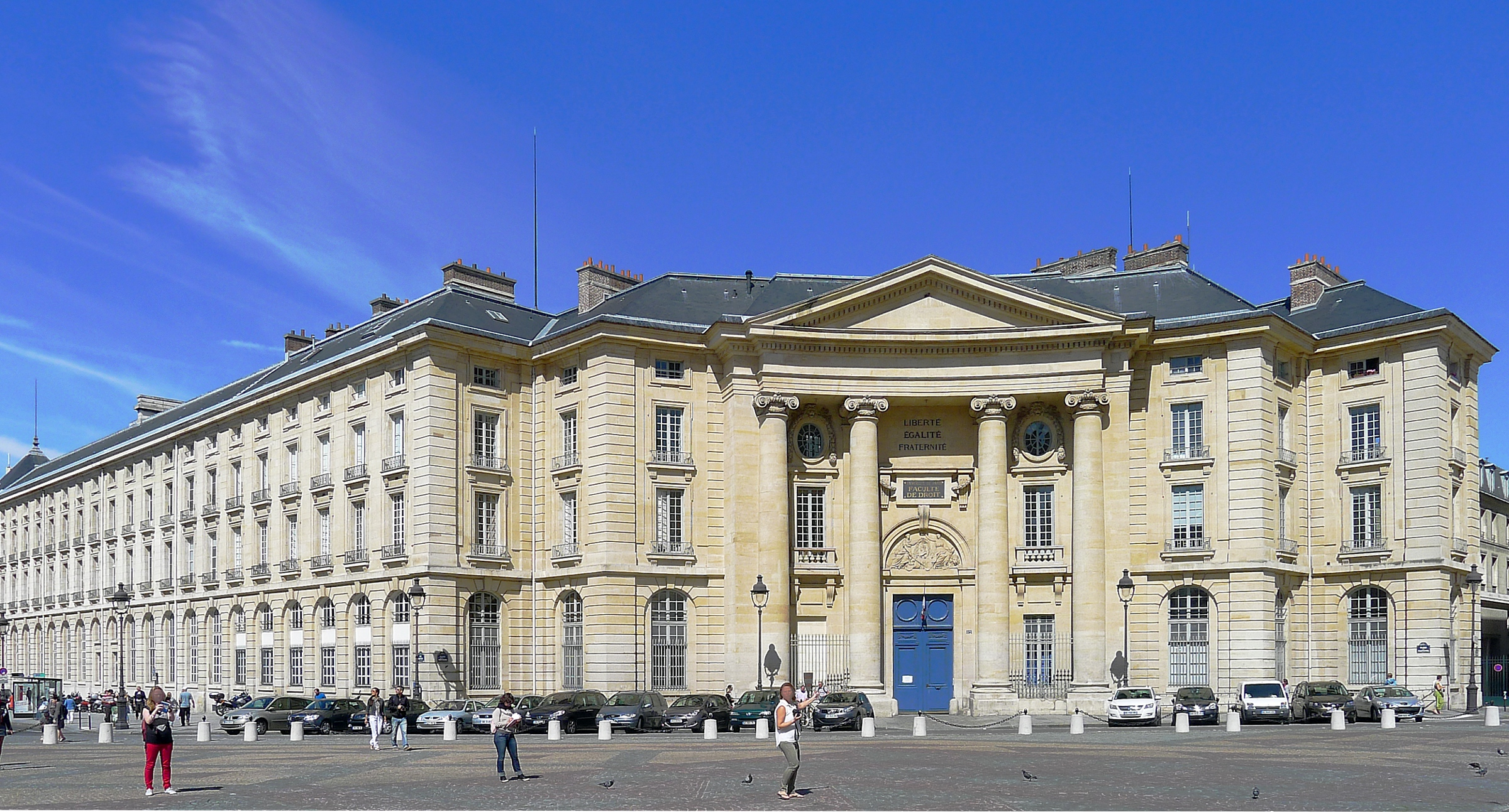 Faculté de droit de Paris, place du Panthéon (n°12) et rue Soufflot - Paris V .